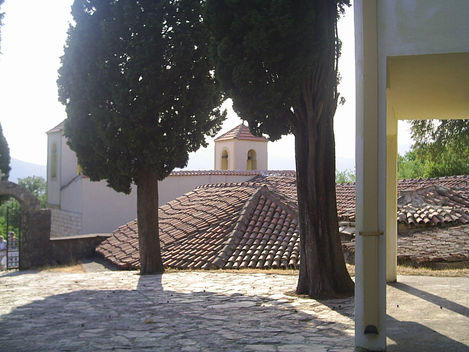 Монастырь Дайбабе. Вид с монастырского дворика